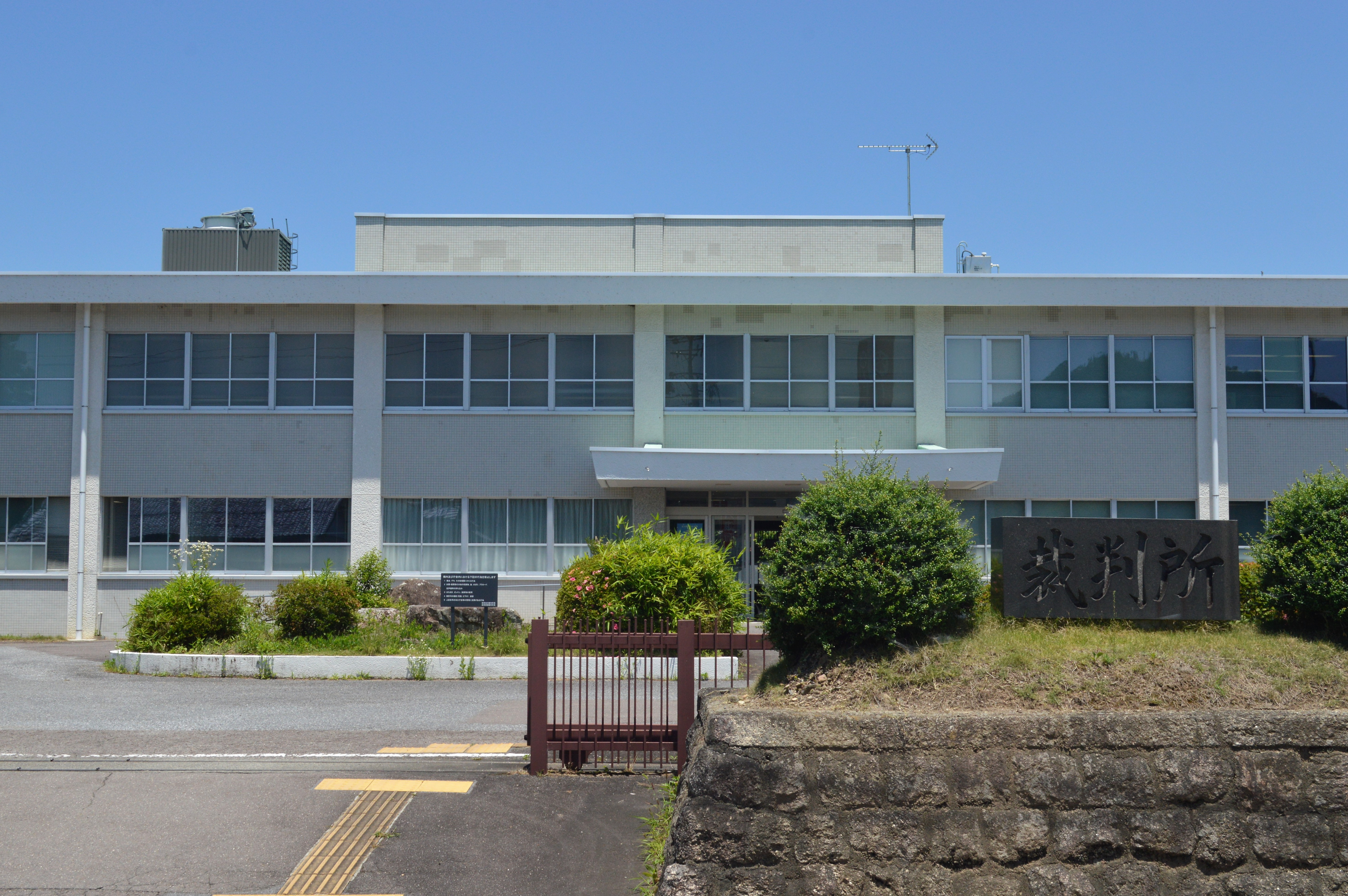 岐阜県可児郡御嵩町にある御嵩簡易裁判所。